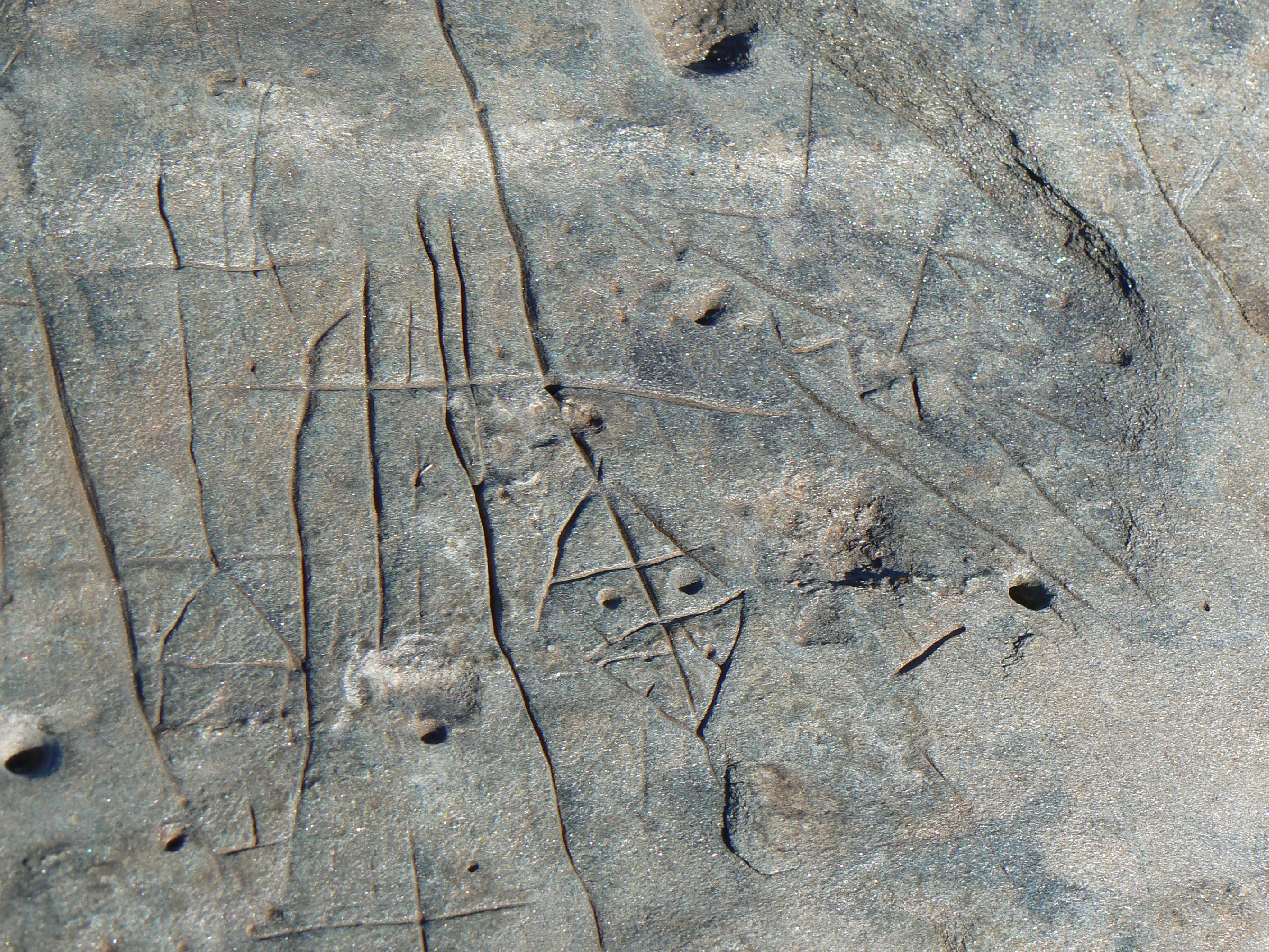 Sito archeologico preistorico di Chenal nei pressi del Castello di Chenal. Montjovet, Valle d'Aosta, Italia.